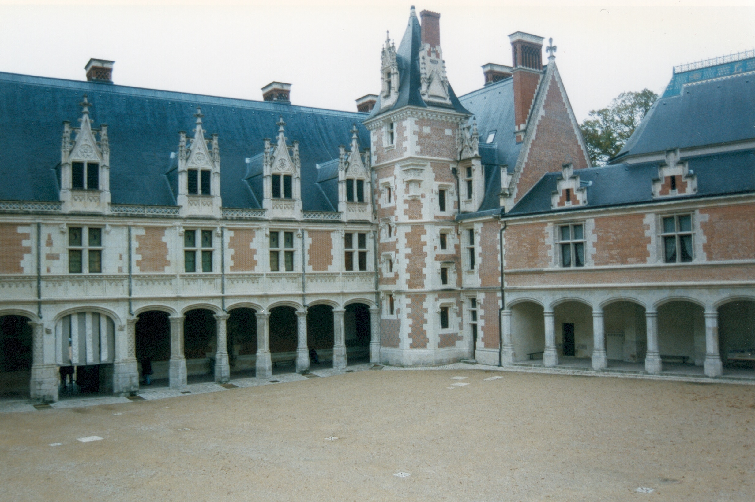 France Loir-et-Cher Blois Château Photographie prise par GIRAUD Patrick